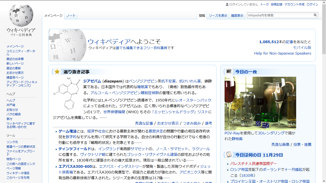 メインページ（ベクタースキン）